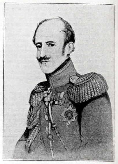 Данное изображение было использовано в статье «Бенкендорф, Александр Христофорович, граф» опубликованной в четвёртом томе «Военной энциклопедии», который был издан книгоиздательским товариществом Ивана Дмитриевича Сытина в 1911 году в столице Российской империи городе Санкт-Петербурге.